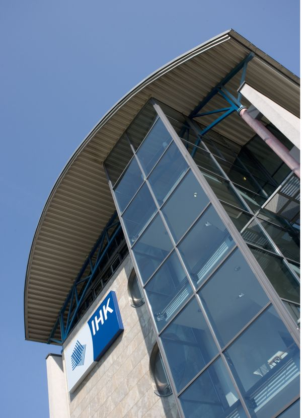 Vorderabsicht des IHK-Gebäudes in der Rheinstraße 89, Darmstadt